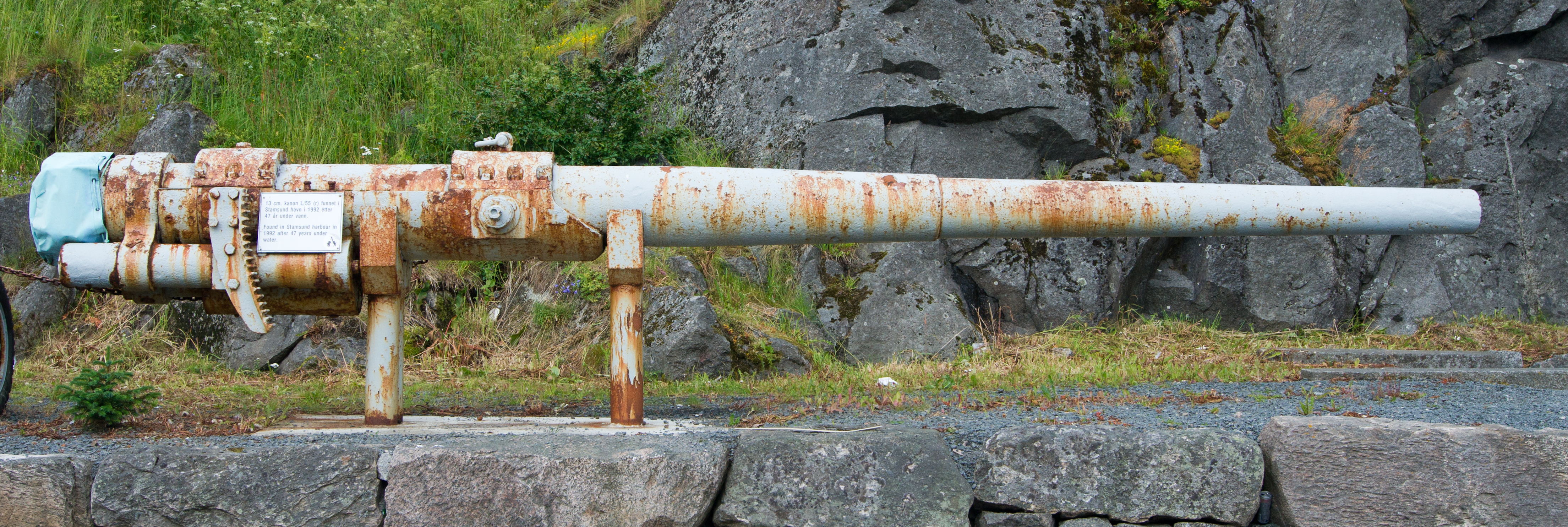 Canon de 13 cm retrouvé dans le port de Stamsund en 1992.